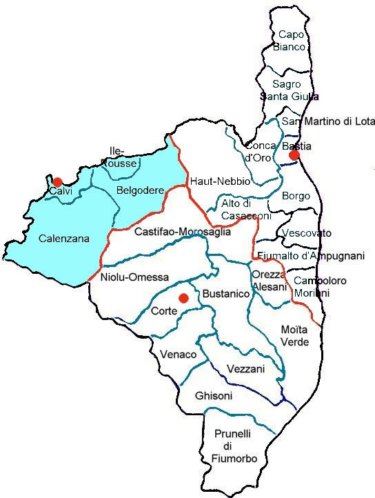 Arrondissement de Calvi, Haute-Corse. Division administrative, finage de l'arrondissement, cantons électoraux. Corsu: U circondu è a ghjura calvinca, cu i cantoni novi